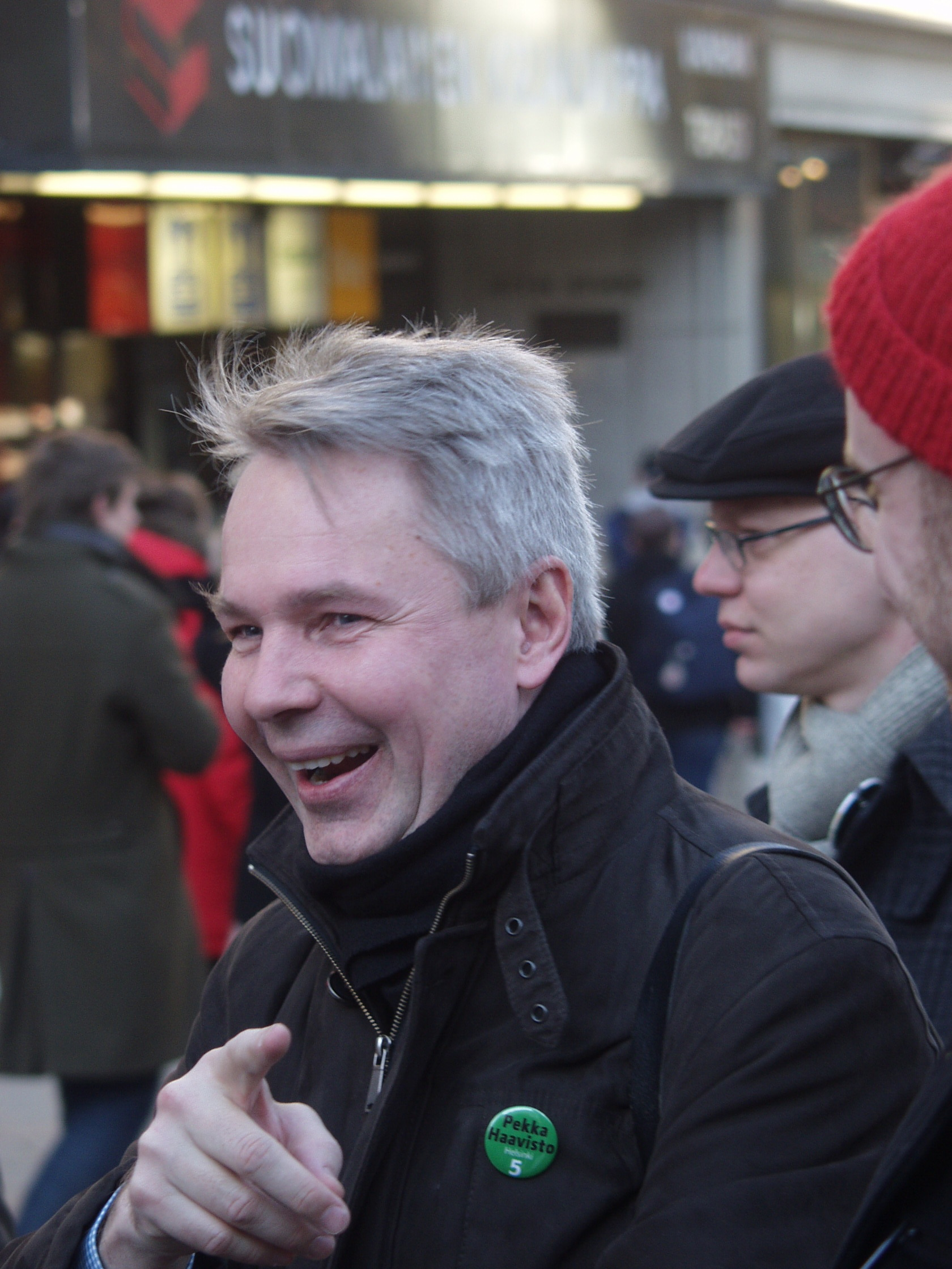 Pekka Haavisto Vihreiden vaalimökillä Kolmen sepän patsaalla huhtikuussa 2011